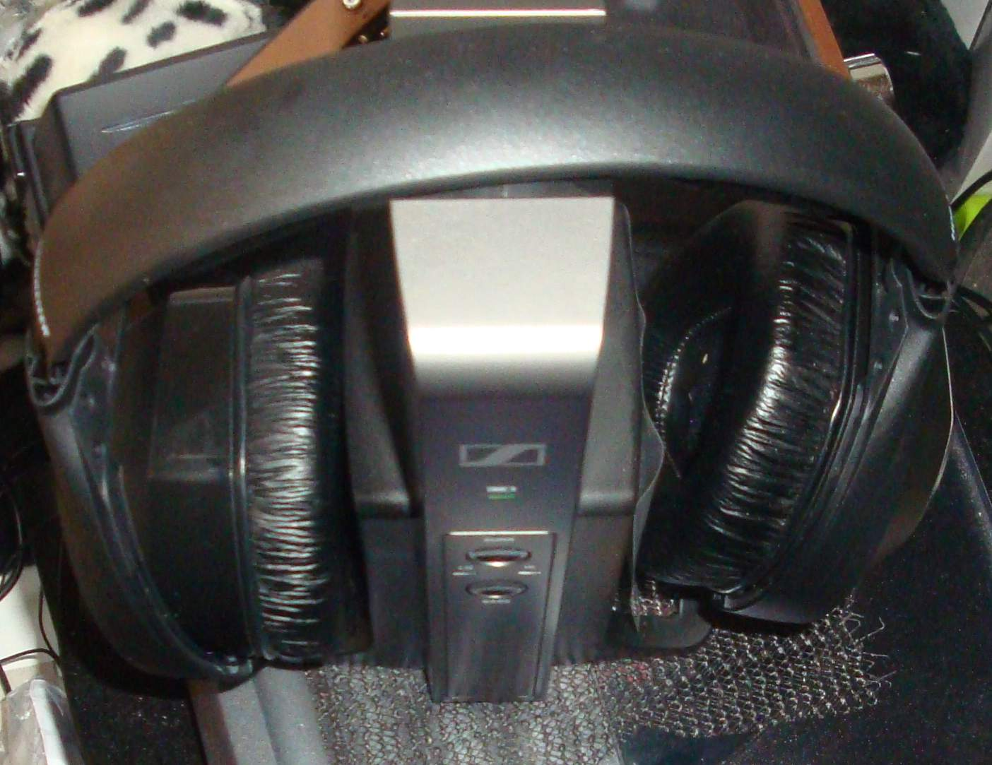 Sennheiser RS 175 draadloze koptelefoon, "over ear", met zender/oplader en met surround, extra bas en geluidsdemping van buitenaf.